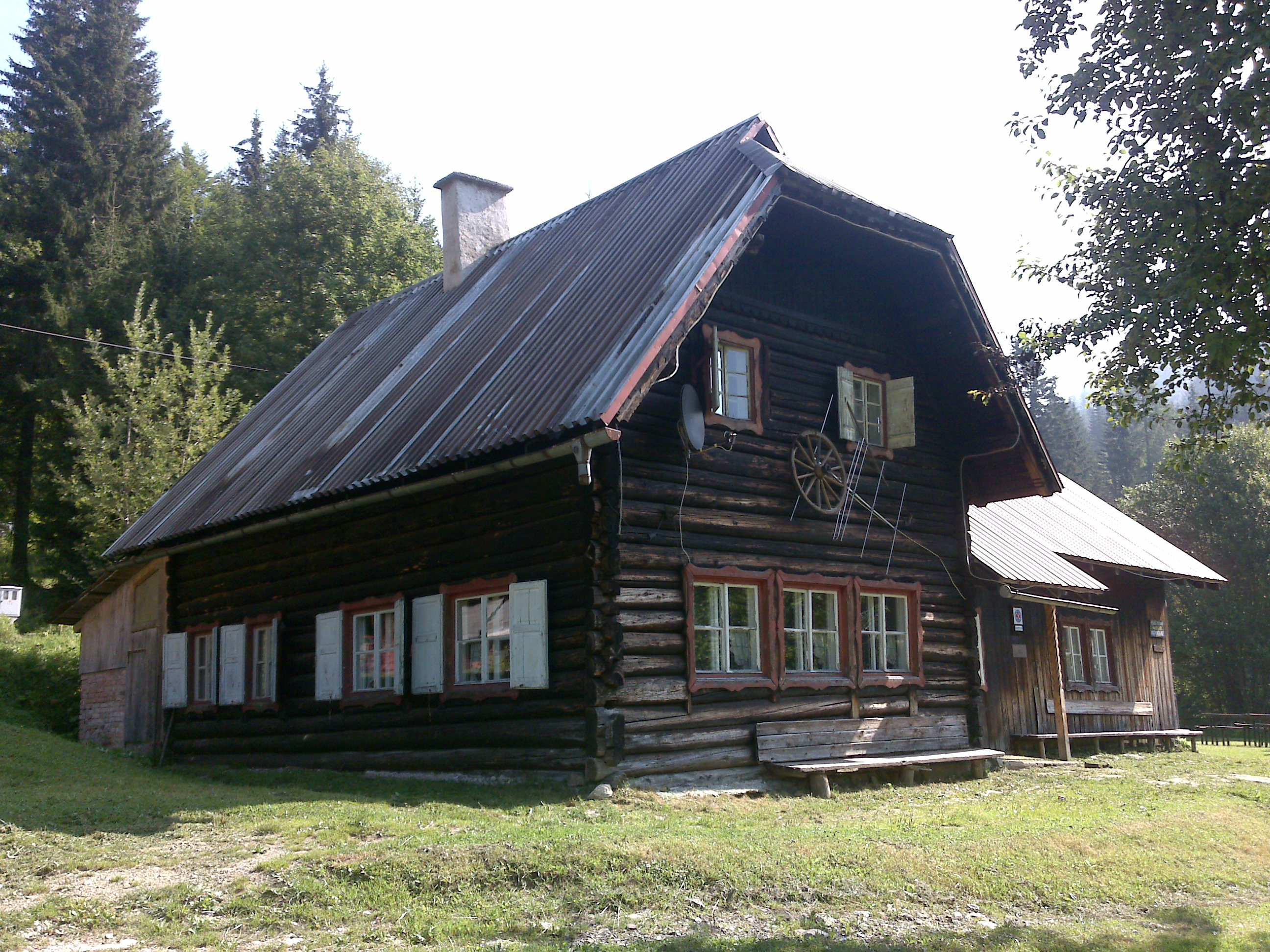 Črni vrh - smučasrki dom